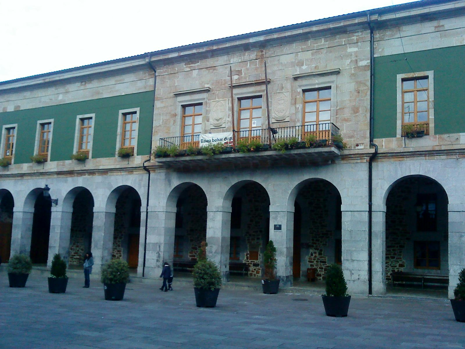 Villaro Areatza (Vizcaya, país vasco, España), Casa consistorial.